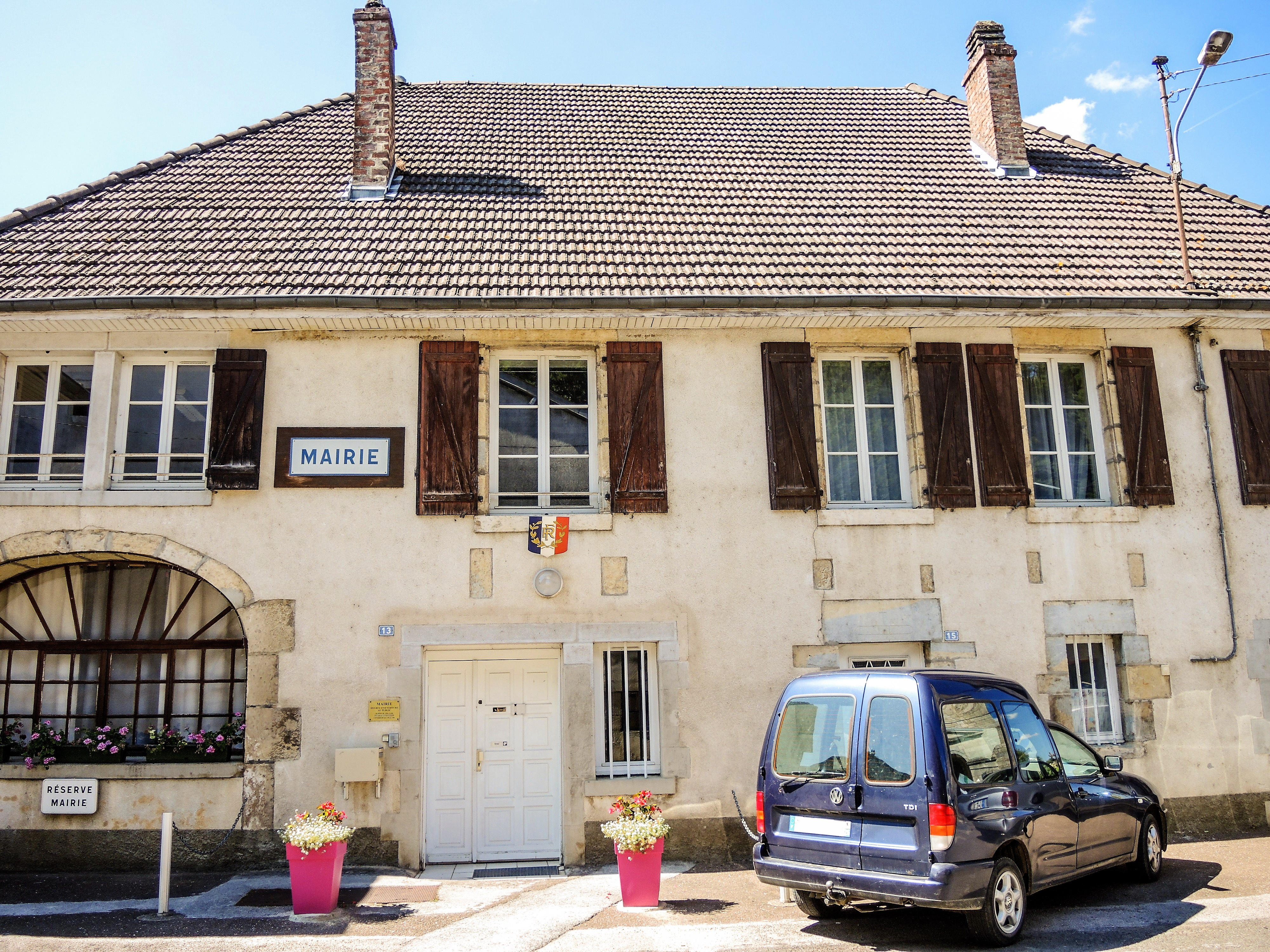 Façade de la mairie de Chalèze. Doubs